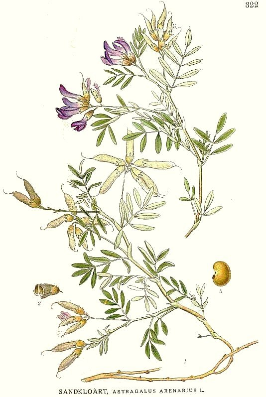 Original Description Sandkloart, Astragalus arenarius L.